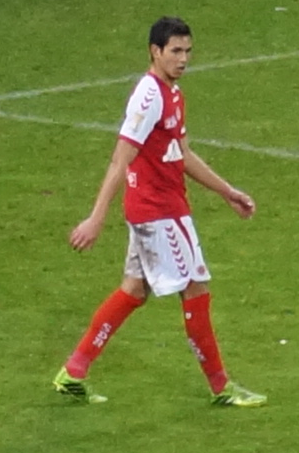 Joueur de foot en pleine action.